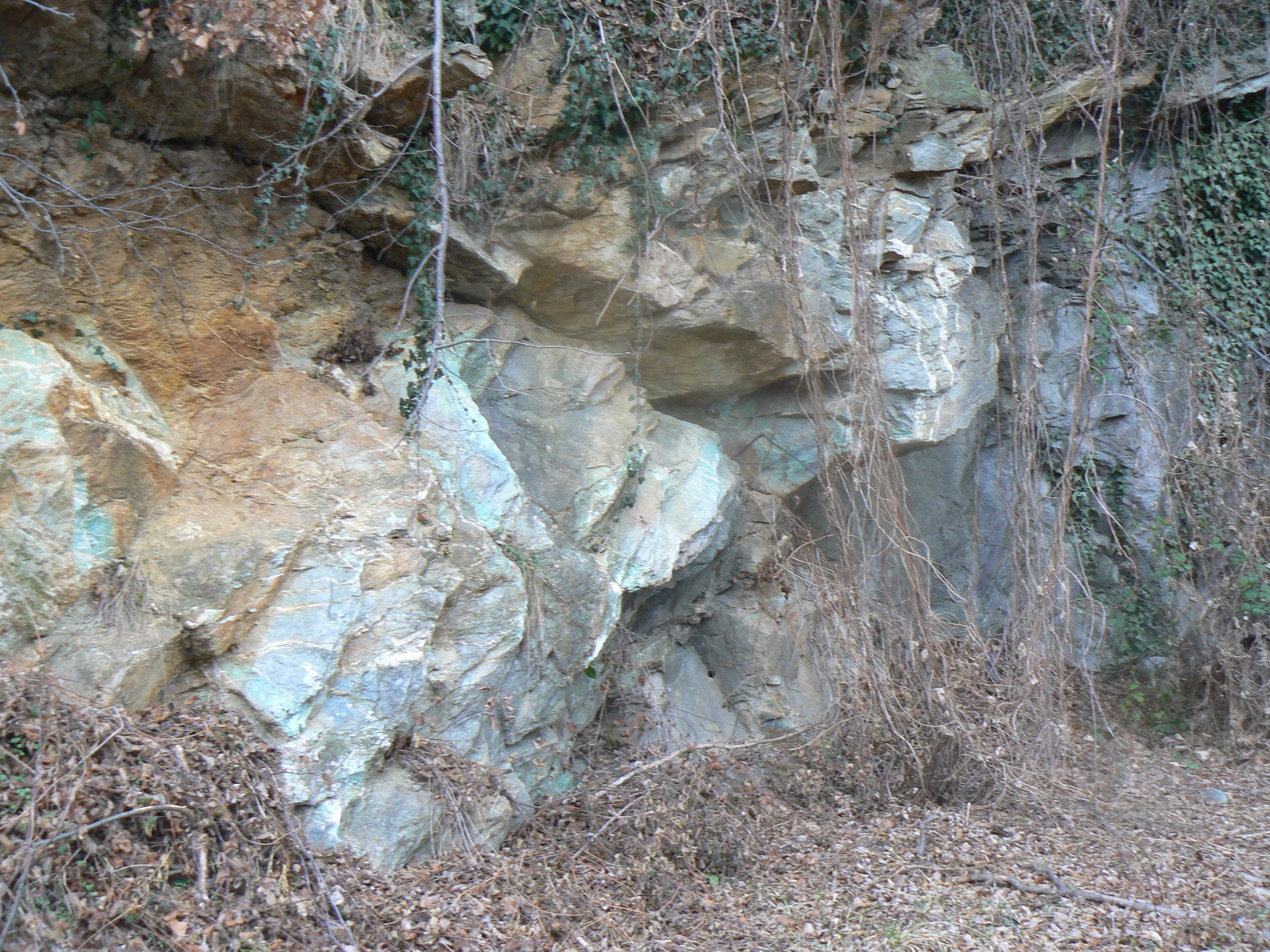 Listveniti nella Cava di Sizan, tra Sizan e Villa: le rocce sono brecce di faglia di età oligocenica, serpentiniti carbonizzate, con presenza di mica di cromo (fuchsitica), che dà il color smeraldo. Challand-Saint-Victor, Valle d'Aosta, Italia.